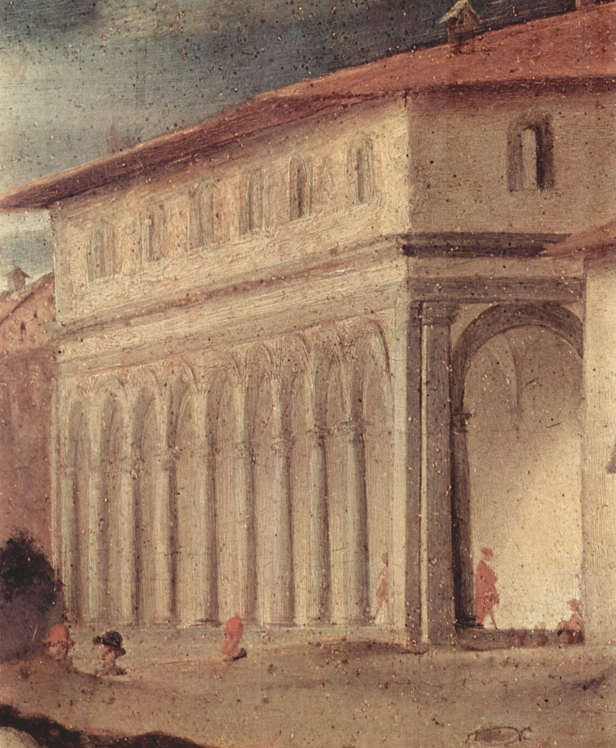 detail